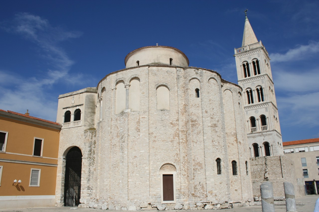 Maciej Piekielnik, Zadar, Forum